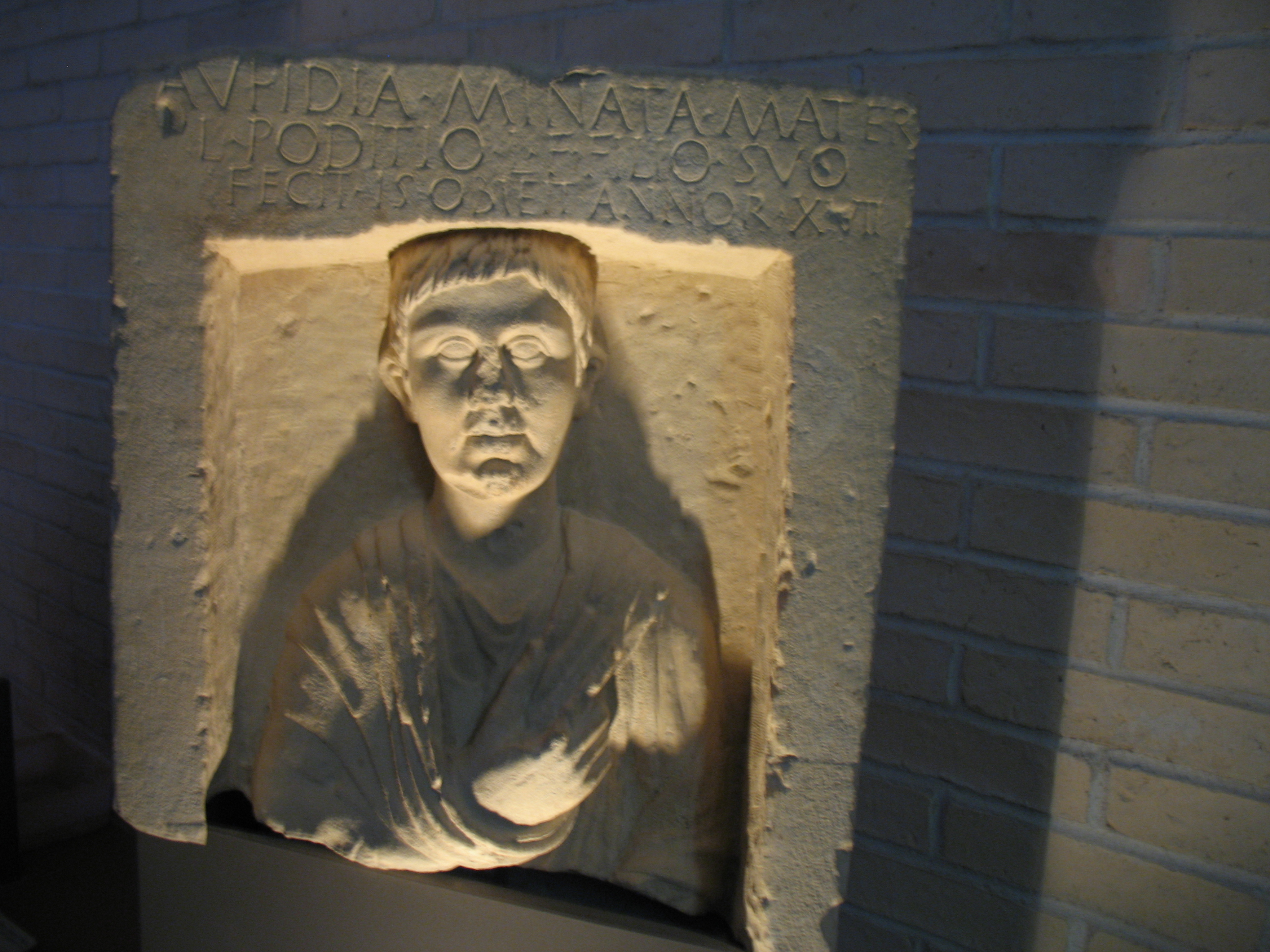 Ritratto commemorativo di epoca romana custodito nel Museo archeologico La Civitella di Chieti